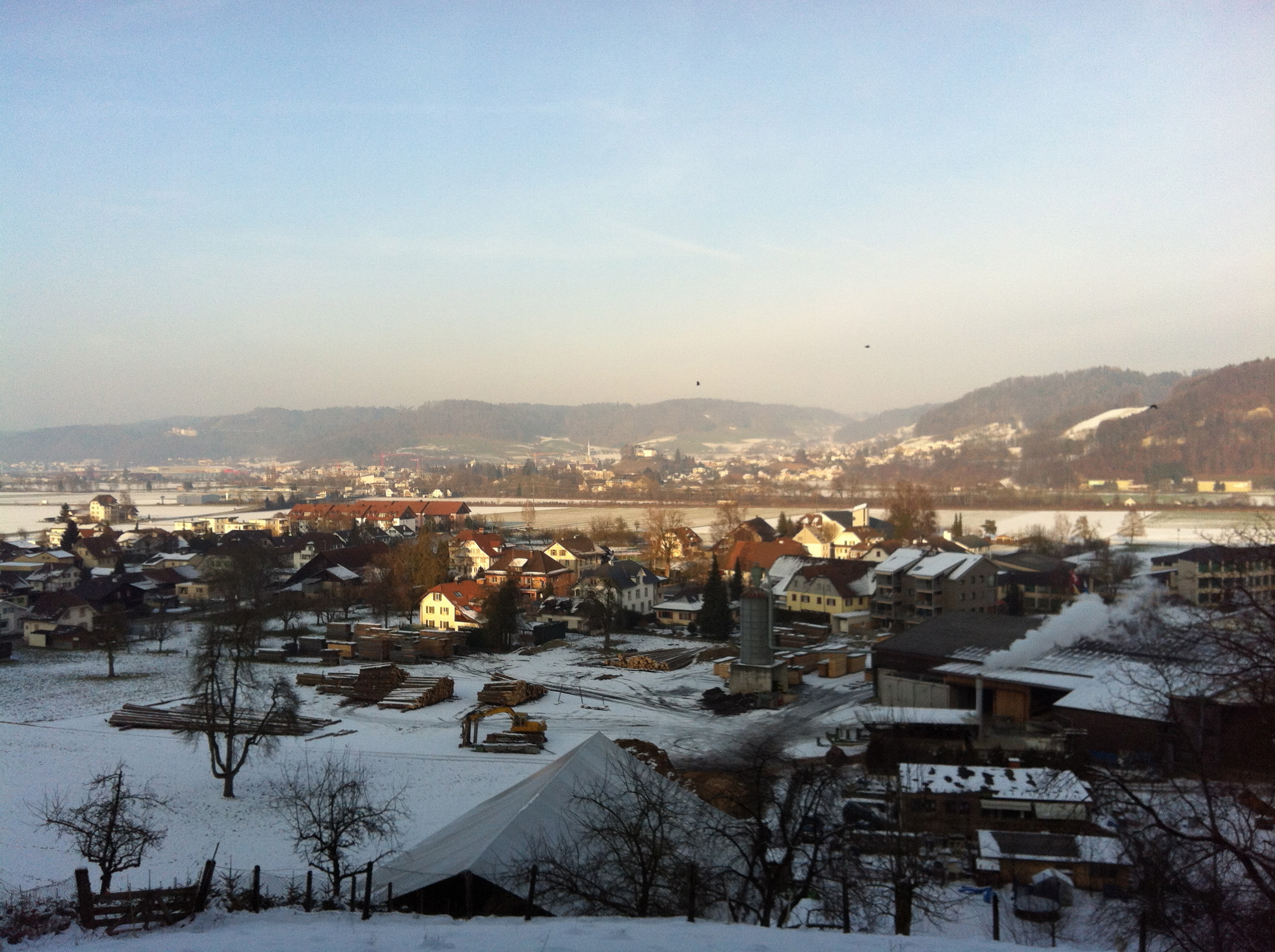 View down to Langnau bei Reiden